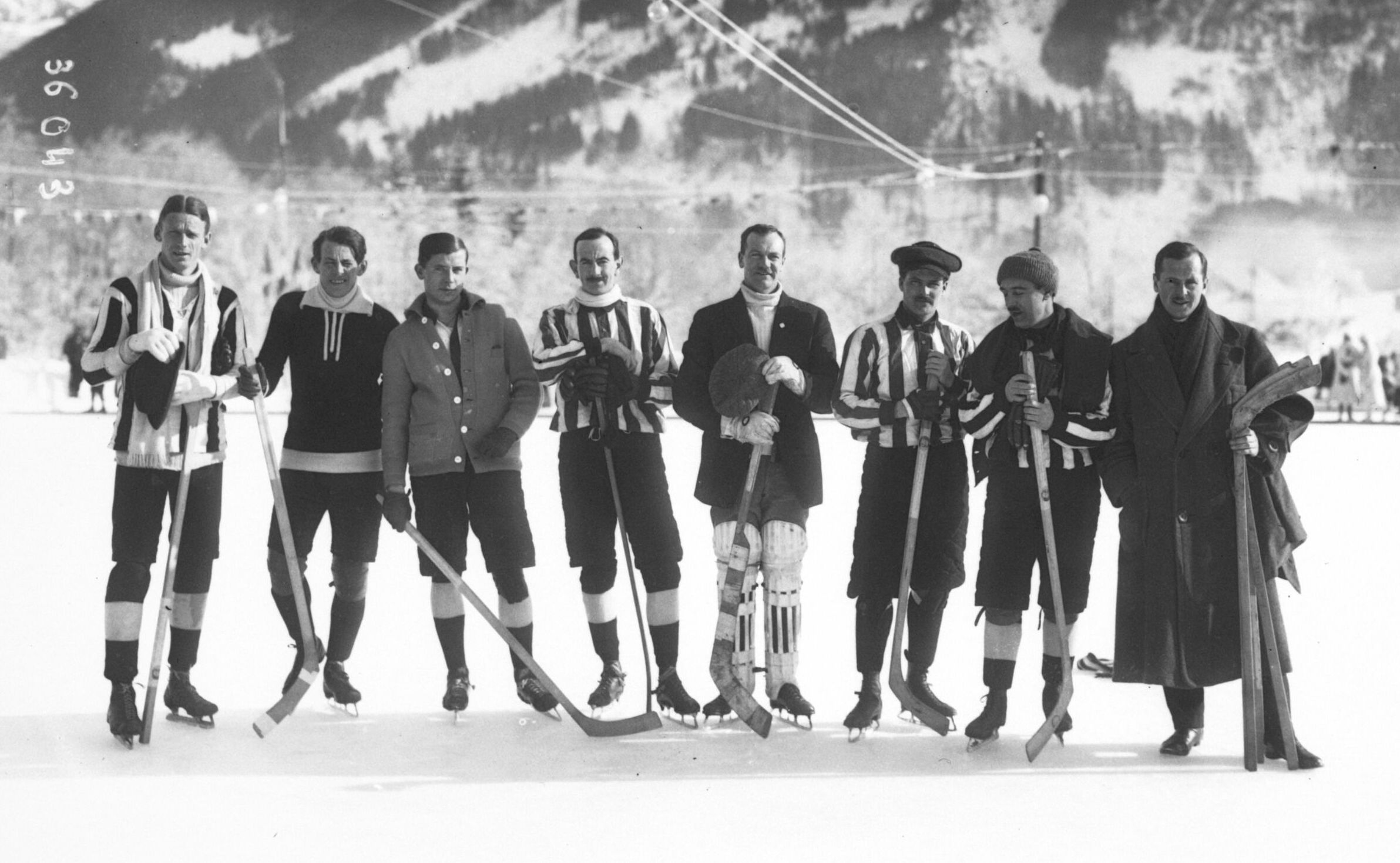 20-1-14, Chamonix, équipe d'Allemagne [de hockey sur glace] : [photographie de presse] / [Agence Rol]